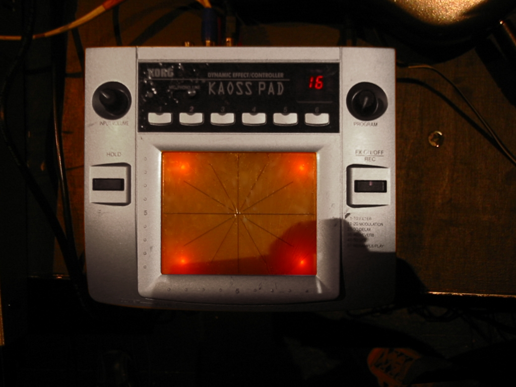 Broken Kaoss pad